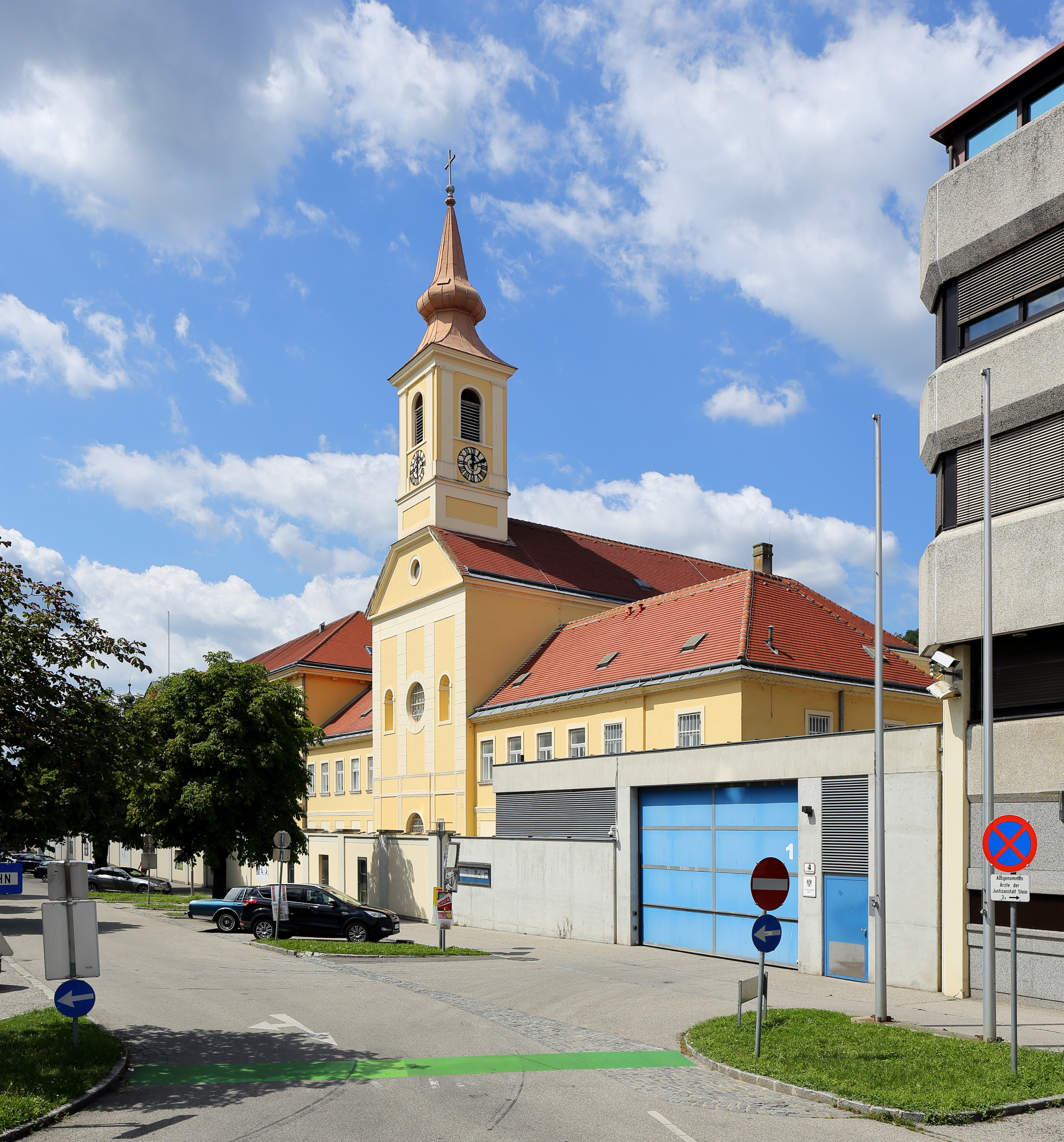 Männer-Strafvollzugsanstalt Stein mit ehemaliger Klosterkirche in Stein an der Donau, ein Stadtteil der niederösterreichischen Stadt Krems.Von 1839 bis 1843 erfolgte die Errichtung des Redemptoristinnenkloster in der Steiner Landstraße. Im Jahr 1848 wurde das Kloster aufgehoben und wird seit 1852 als Strafanstalt genutzt, wobei diese in mehreren Phasen ausgebaut wurde.